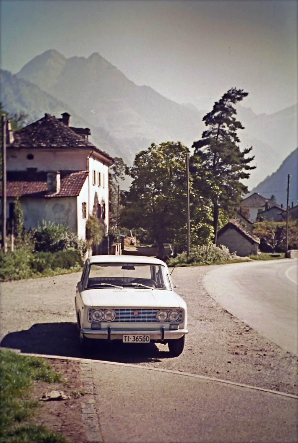 Foto analogica (rifotografato) scattata nel 1972 a Malvaglia, Ticino, Svizzera Cima di Biasagn 2417 m Switzerland » Ticino » Distretto di Riviera » Biasca